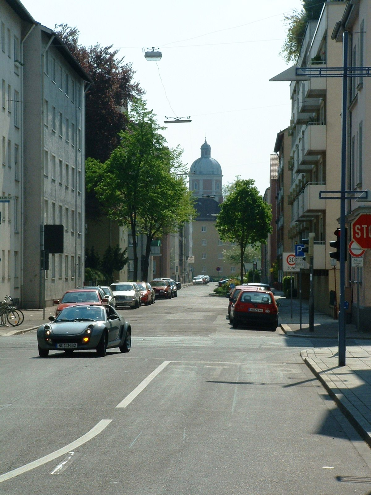 Blick durch die Friedenstraße in Neu-Ulm auf den Wasserturm, der in Ermangelung anderer herausragender Bauten als das Wahrzeichen von Neu-Ulm angesehen wird